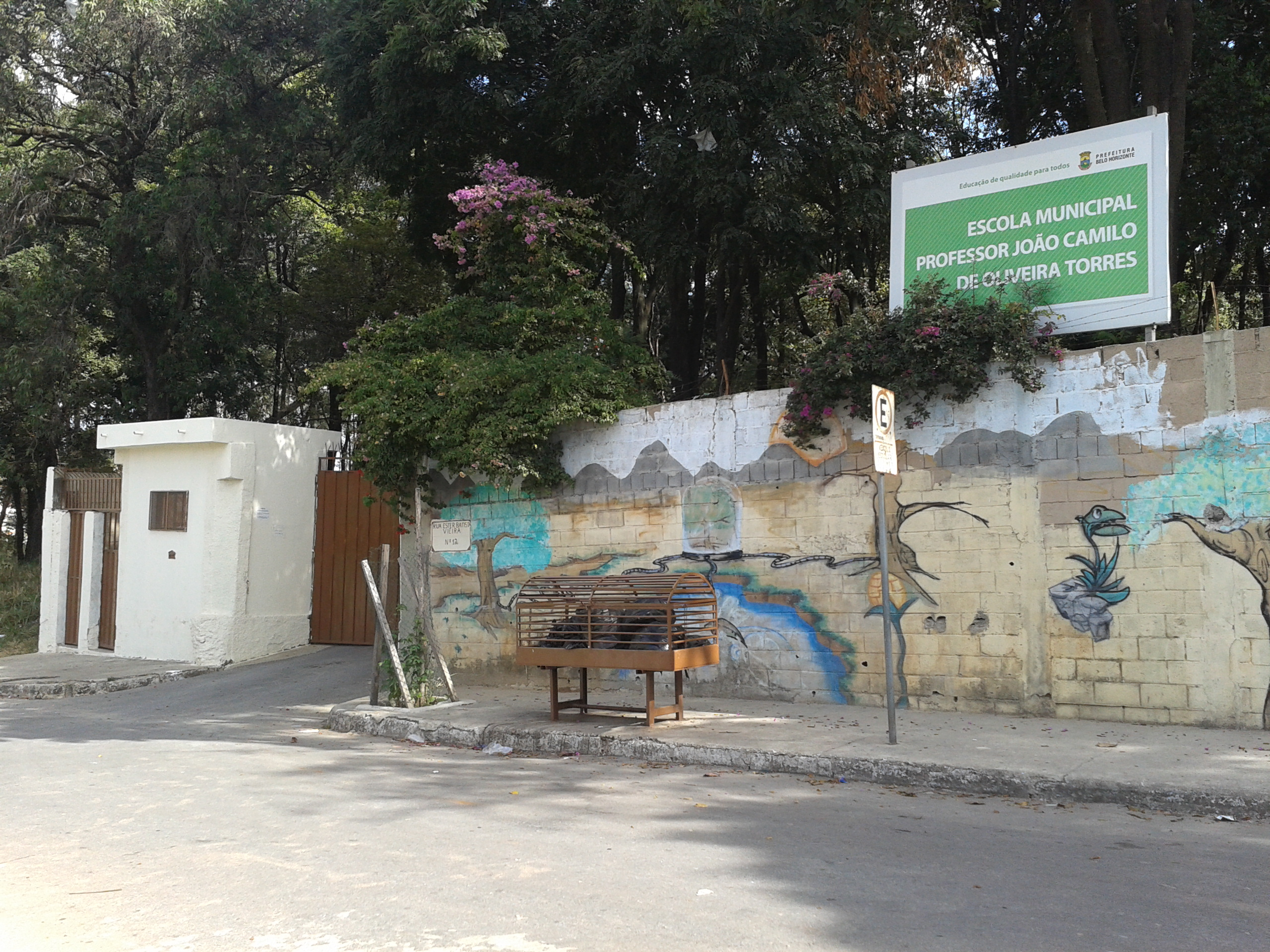 Fachada da Escola Estadual João Camilo de Oliveira Torres. Foto tirada na Rua Ester Batista Vieira, 12, Califórnia, Belo Horizonte, MG